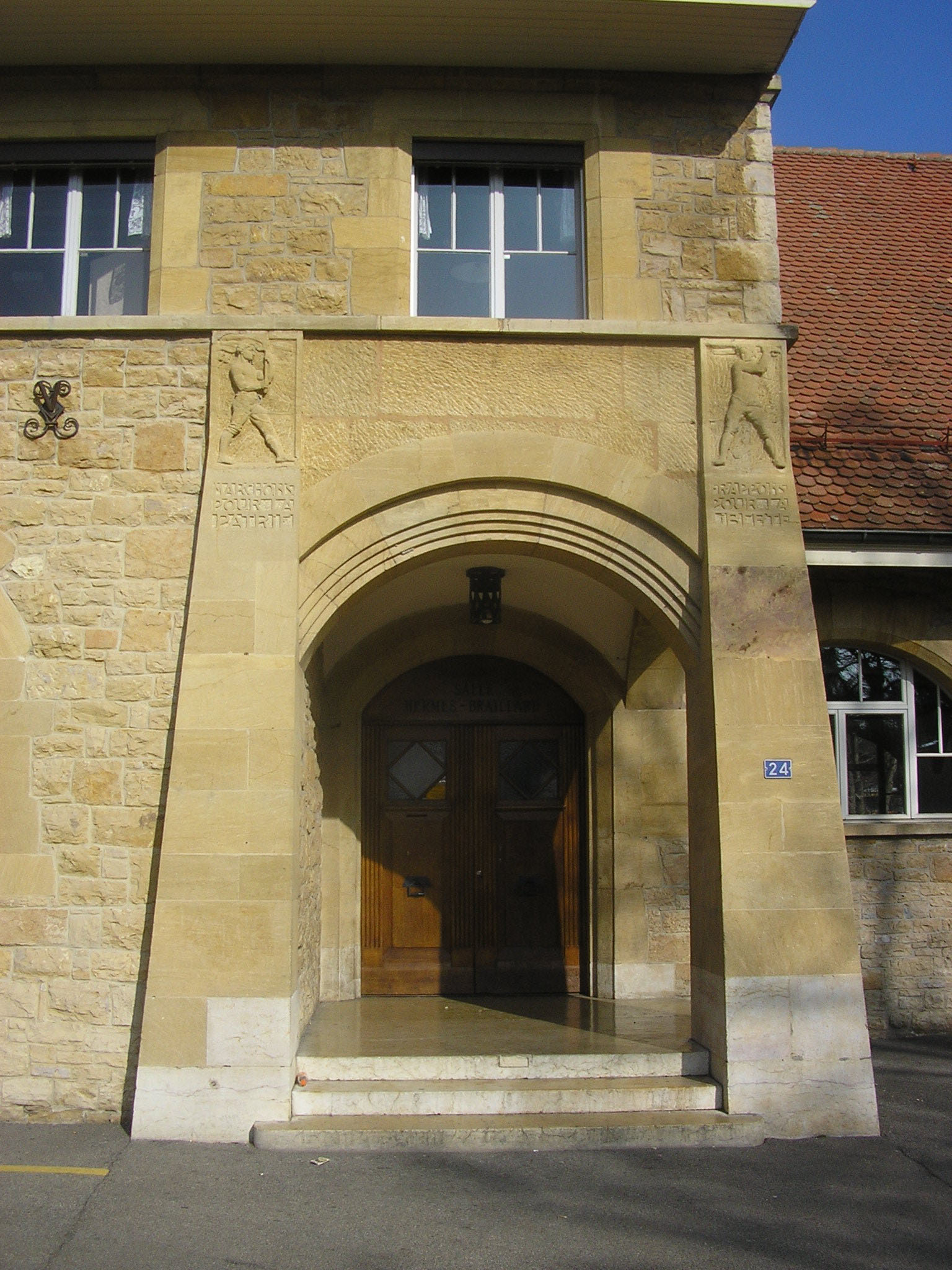 École du vieux village, commune d'Onex à Genève, porche. Avec les textes : « Marchons pour la patrie » et « Frappons pour la liberté ».